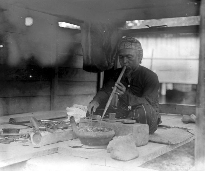 Repronegatief. De heupbedekking van de man is waarschijnlijk een doeksoort die "gatip ampar" heet.. Een goudsmid aan het werk in de Karolanden